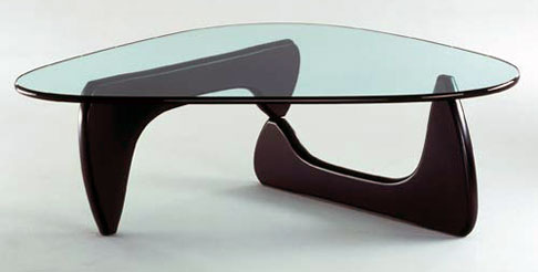 La fameuse Table-basse du designer nippon-américan Isamu Noguchi, présentée lors de l'exposition "Art nouveau Revival" au musée d'Orsay. Noguchi coffee table